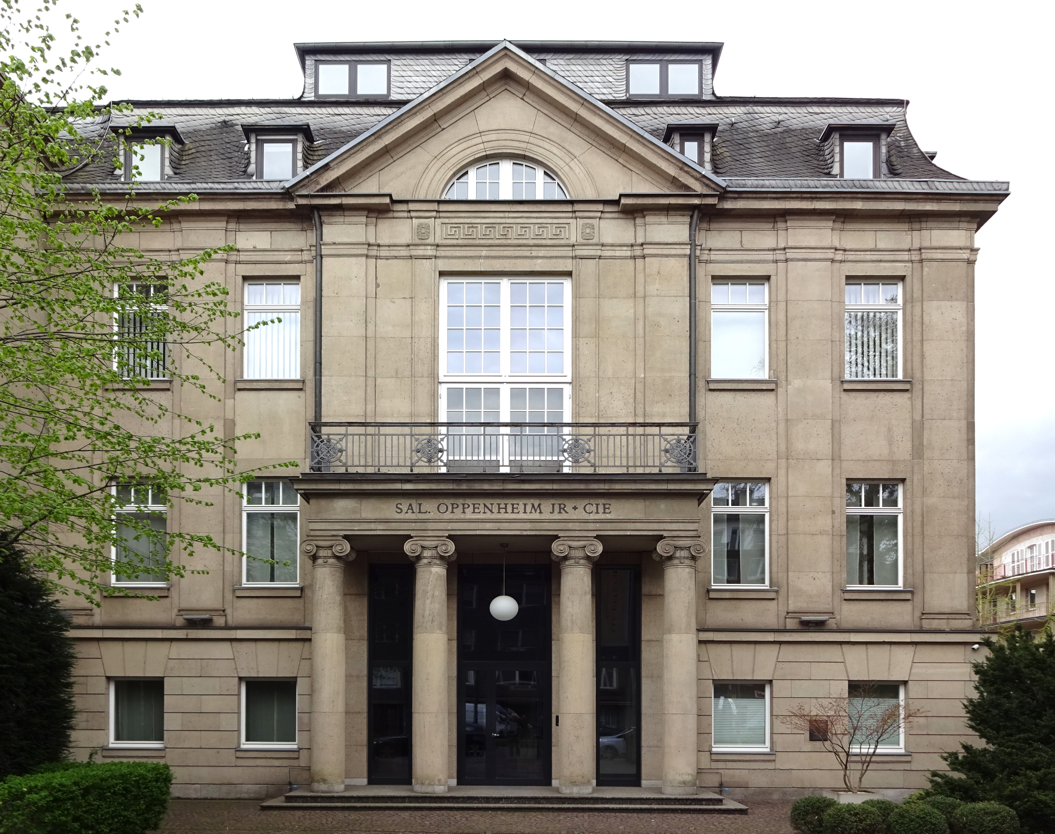 Stadtpalais Pempelforter Straße 11, Seite zur Pempelforter Straße "SAL. OPPENHEIM JR & CIE", Düsseldorf-Pempelfort